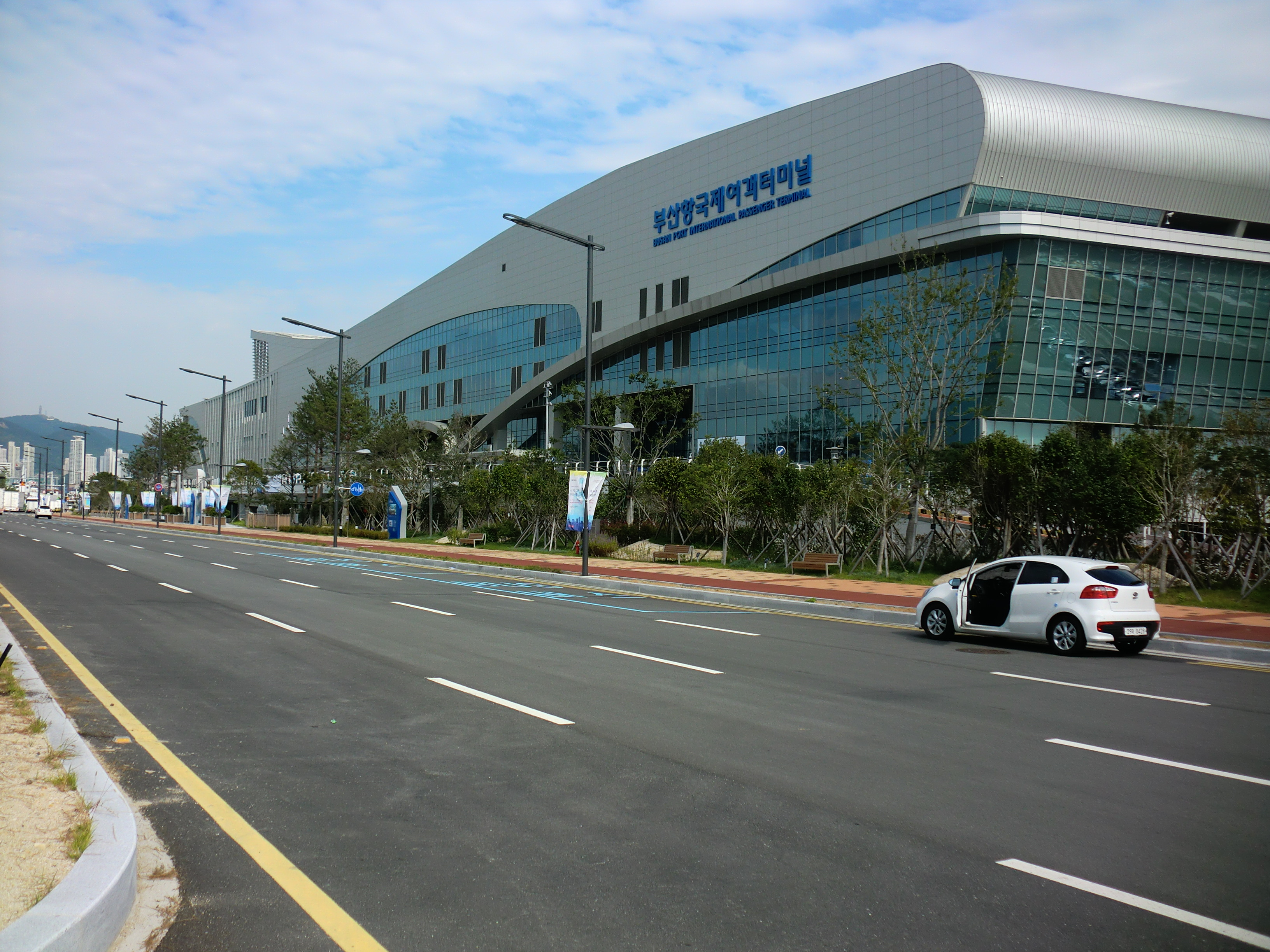 부산항국제터미널